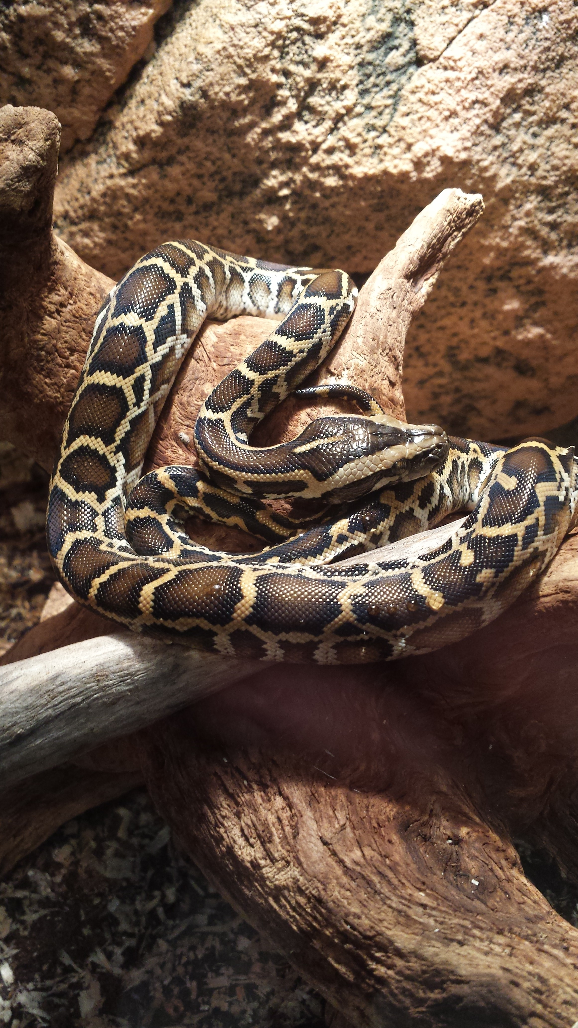 Tigerpyton